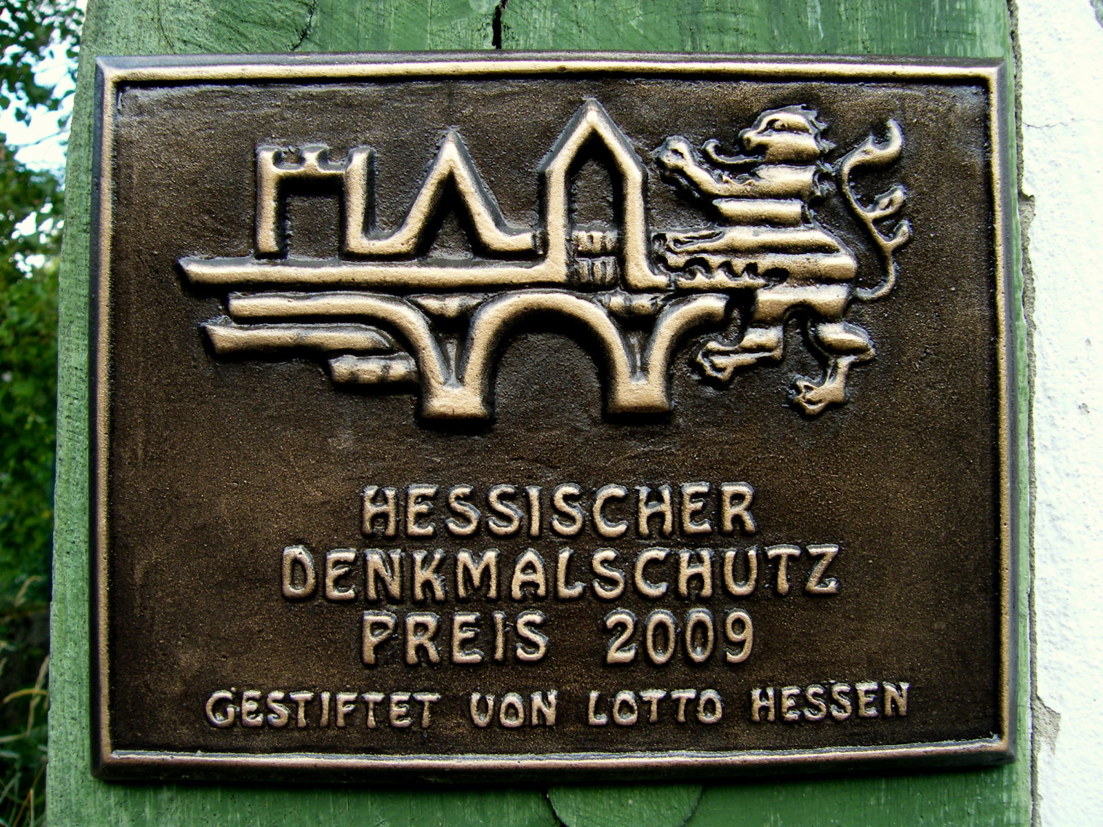 Ehem. Synagoge Vöhl - Denkmalschutzpreis 2009